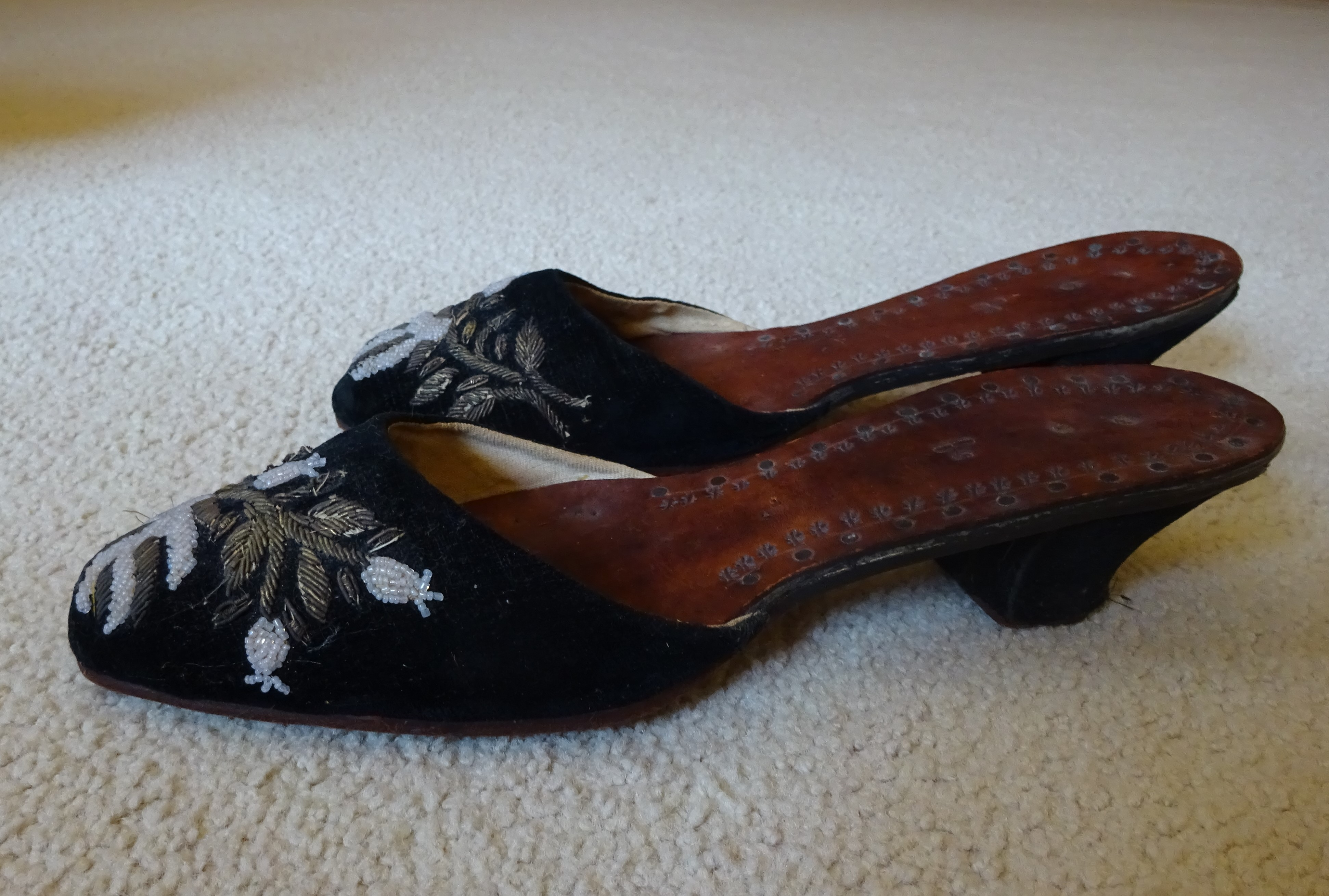 Muiltjes uit Nederlands-Indië, fluweel met gouddraad en kralen, rond 1915